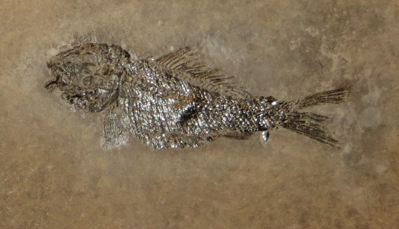 Fossil of Legnonotus, an extinct fish- Took the picture at Museo di Scienze Naturali, Bergamo